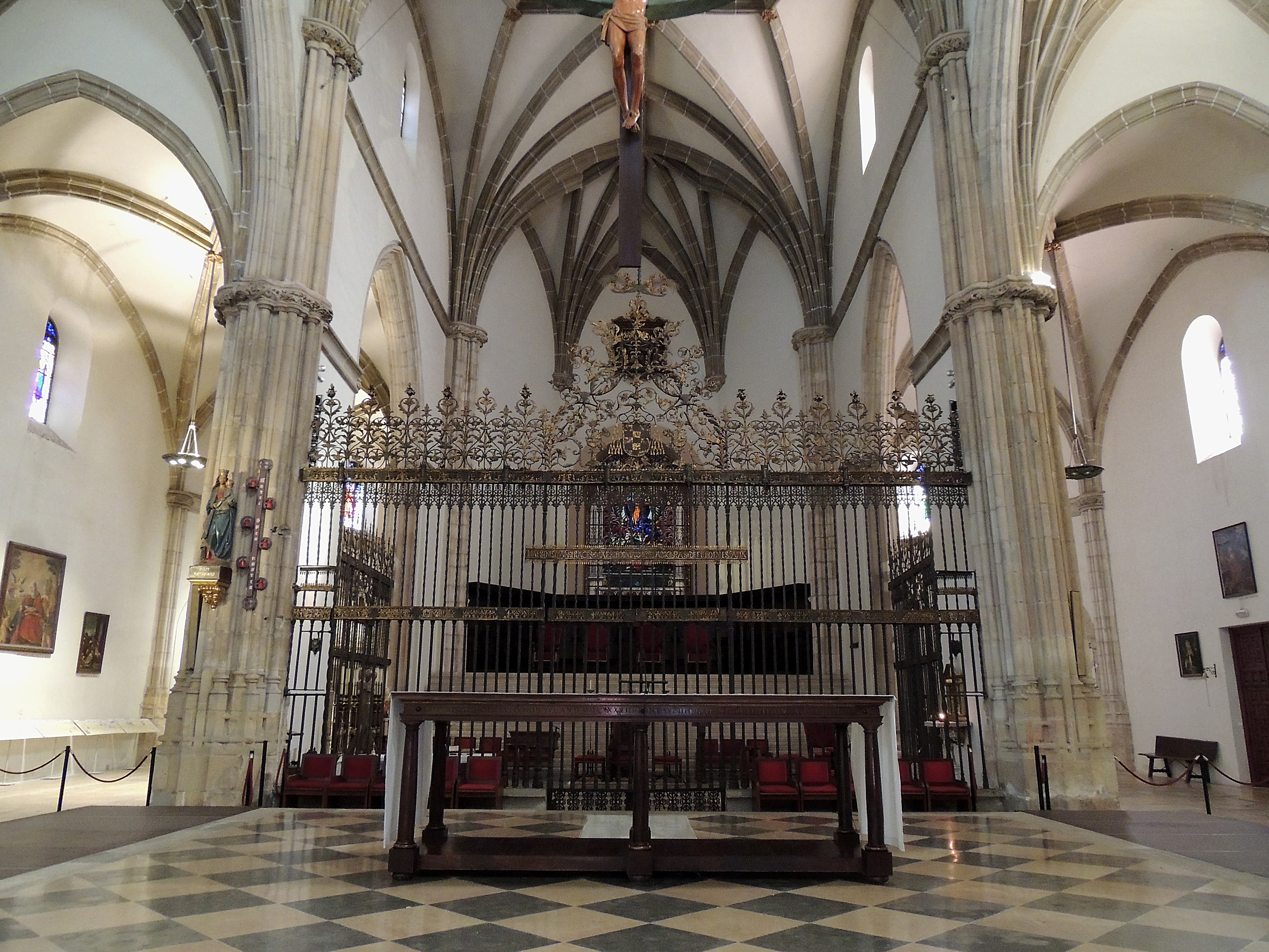 Interior de la catedral de Alcalá de Henares